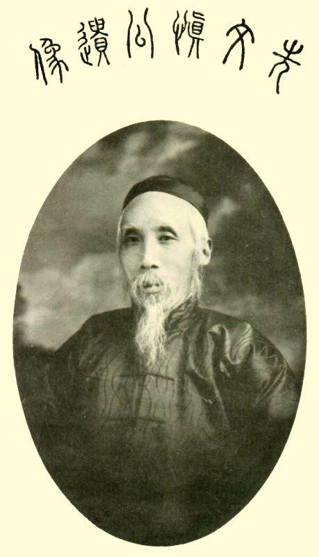 瞿鸿禨